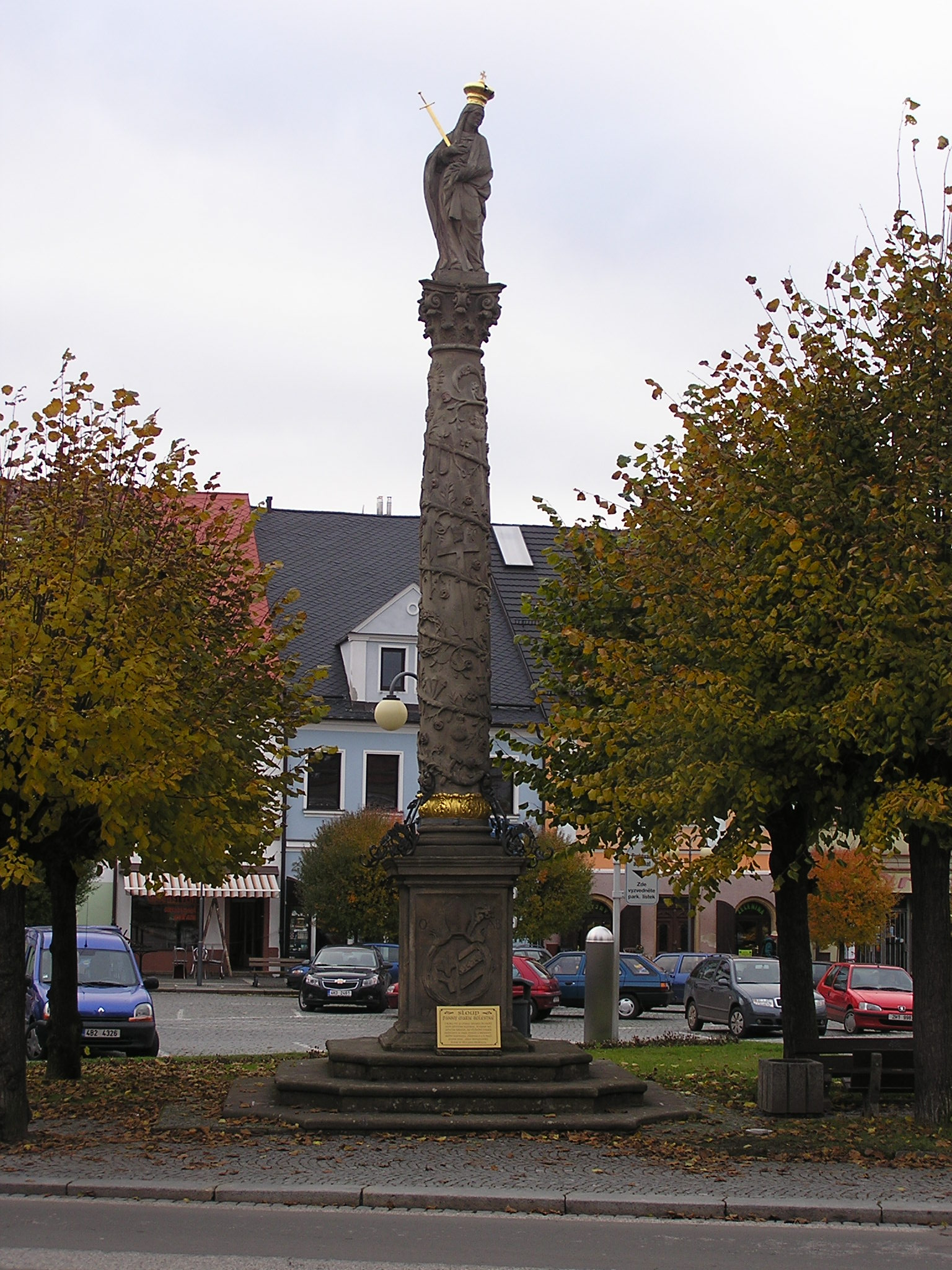 Police nad Metují, sloup na náměstí